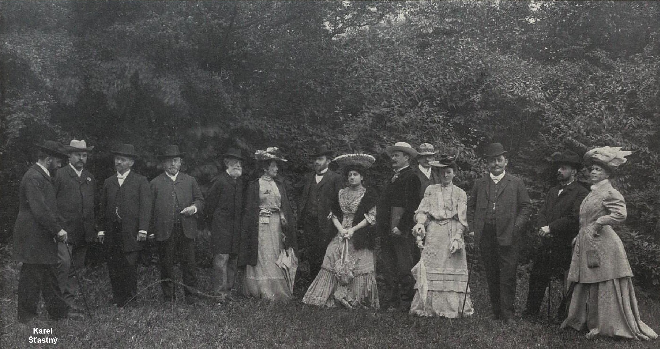 Od leva: Karel Šťastný, Jan Vandas, Otto Poppler, mistr Alois Jirásek, Karel Smetana bratr Bedřicha Smetany, jeho dcera Růžena, Oldřich Šťastný, pí M. Zajíčková, František Pácal, Jaroslav Kvapil, pí K. Laubová, tehdejší purkmistr a starosta osady lékárník Jan Laub, Břetislav Šťastný,pí Hana Kvapilová